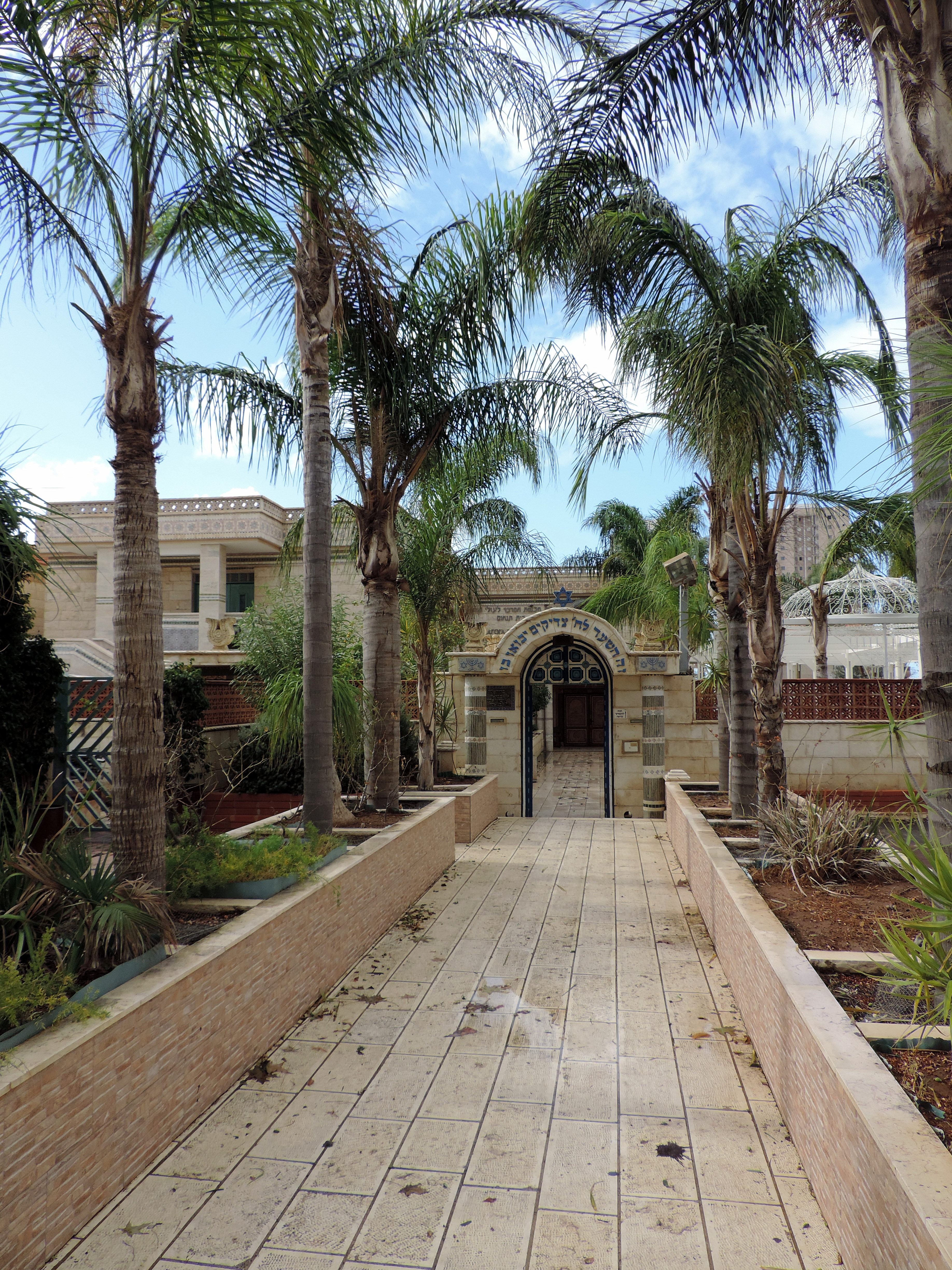 שדרת הכניסה לבית הכנסת בית תנחום